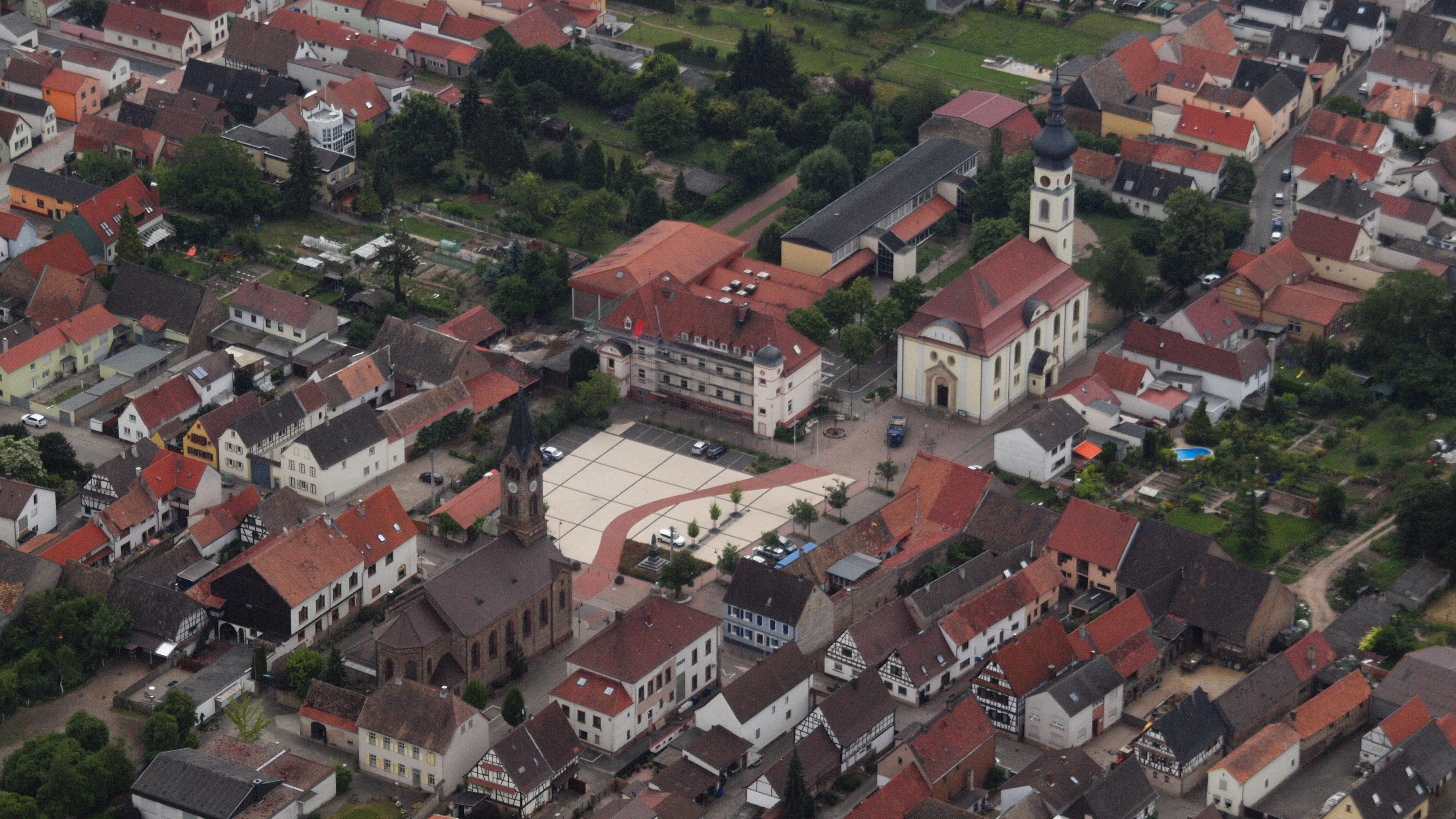 Zentrum von Böhl-Iggelheim: Luftaufnahme